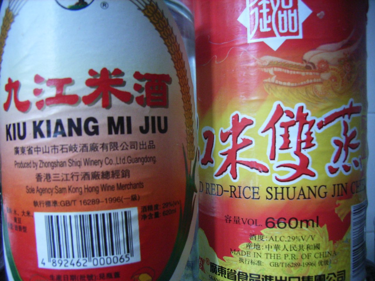 酒精度ALC 有29% V/V 的中國米酒 Mi Jiu